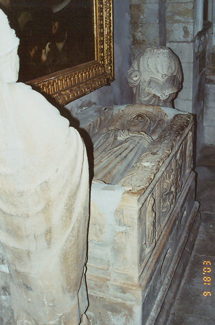 Tumba de Santa Marta por Francesco Laurana, en la Cathédrale Sainte-Marthe de Tarascon